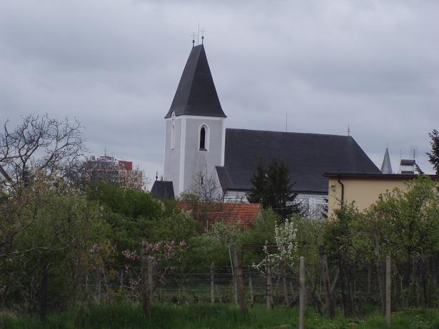 Farský kostol v Rači